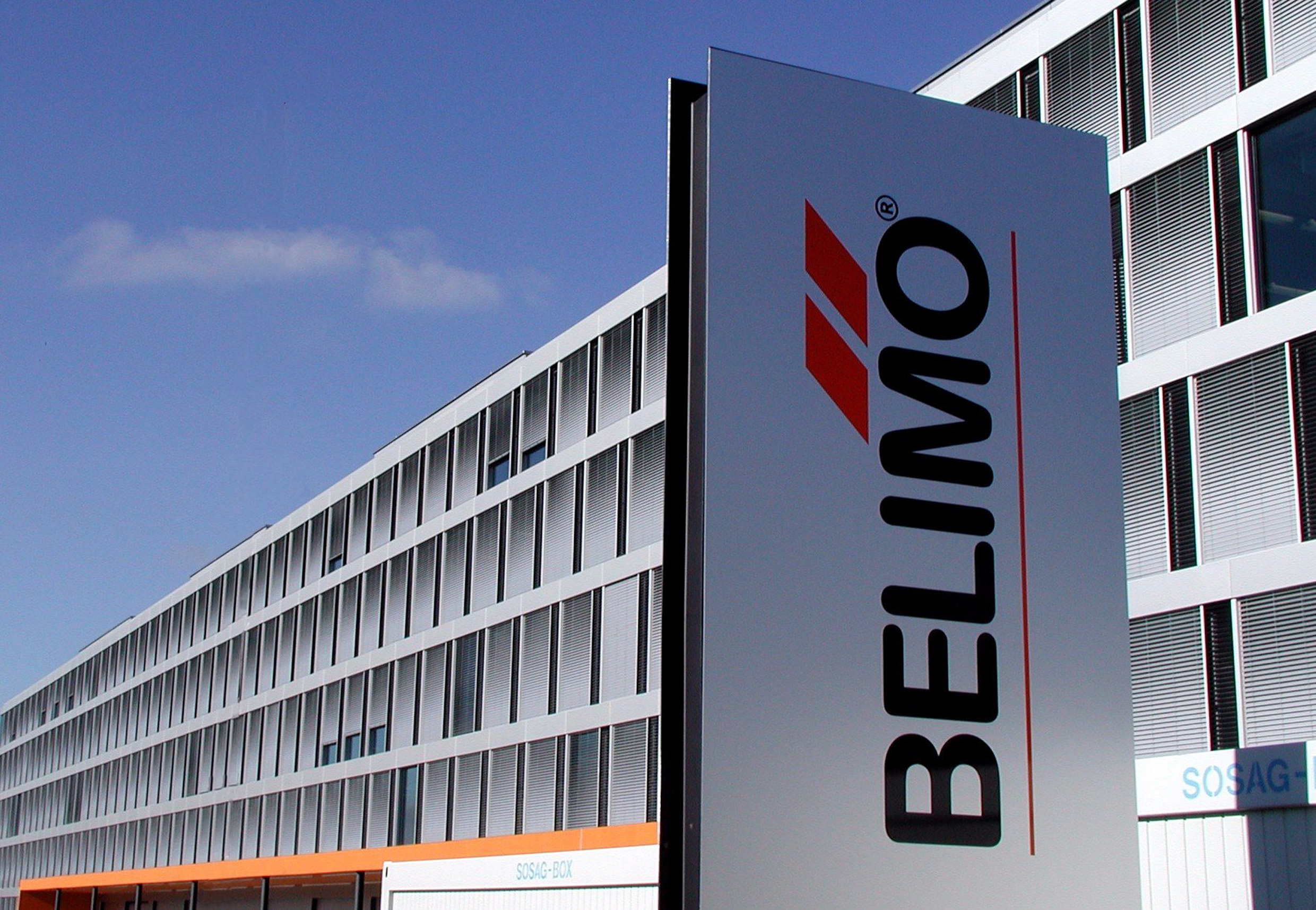 Belimo Hauptsitz Schweiz